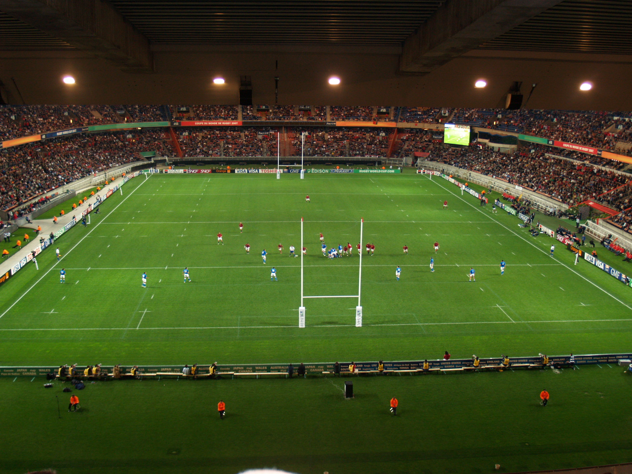 Match Italie contre le Portugal - Coupe du Monde de Rugby 2007